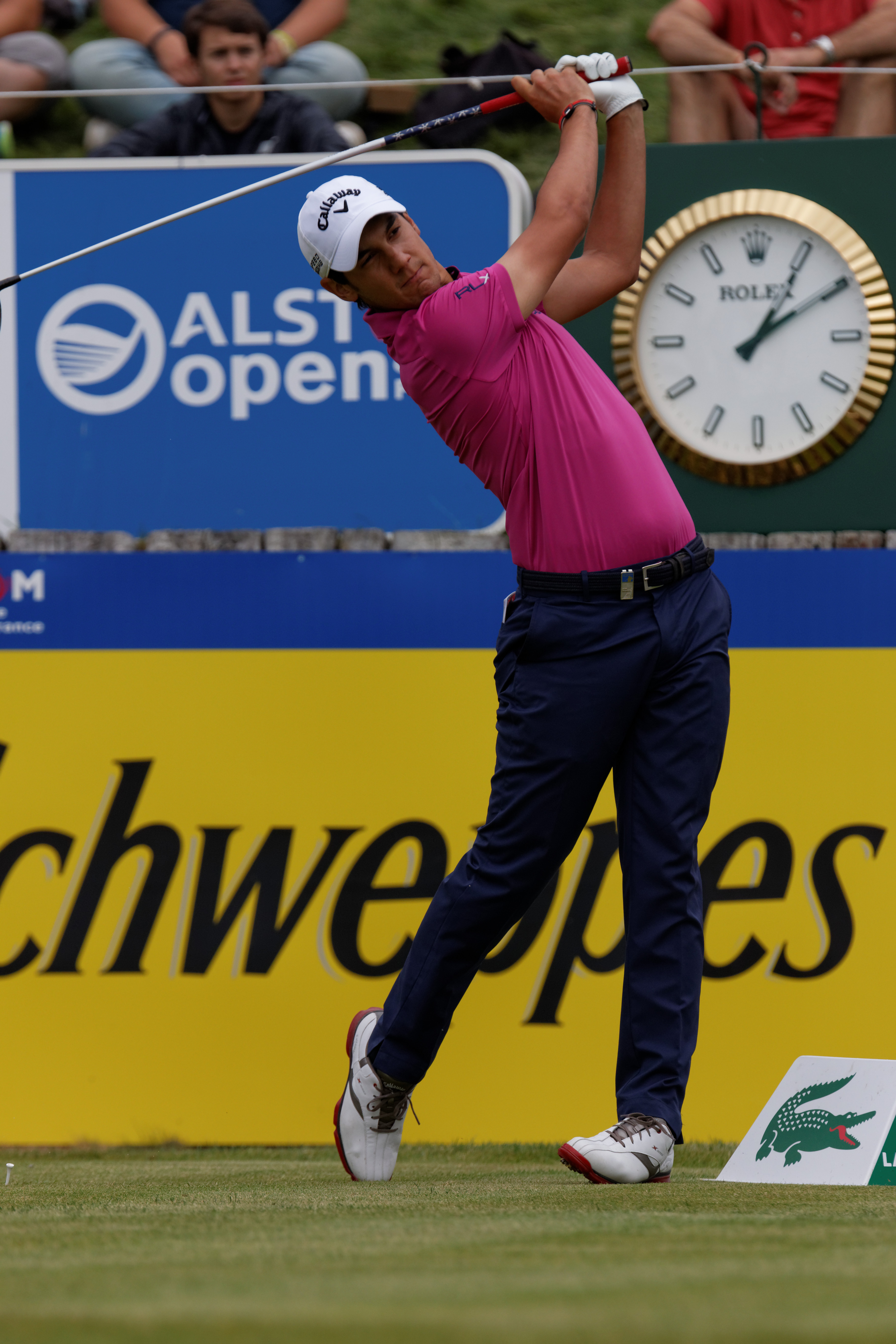 Matteo Manassero lors du second tour de l'Open de France 2014 - Golf National - Saint-Quentin-en-Yvelines (78) - départ du trou n° 1